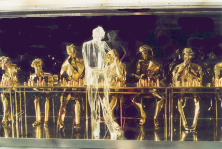 Detail van de schaaksimultaanseance in messing en perspex, begonnen 1976, voltooid 1992 (particulier bezit)